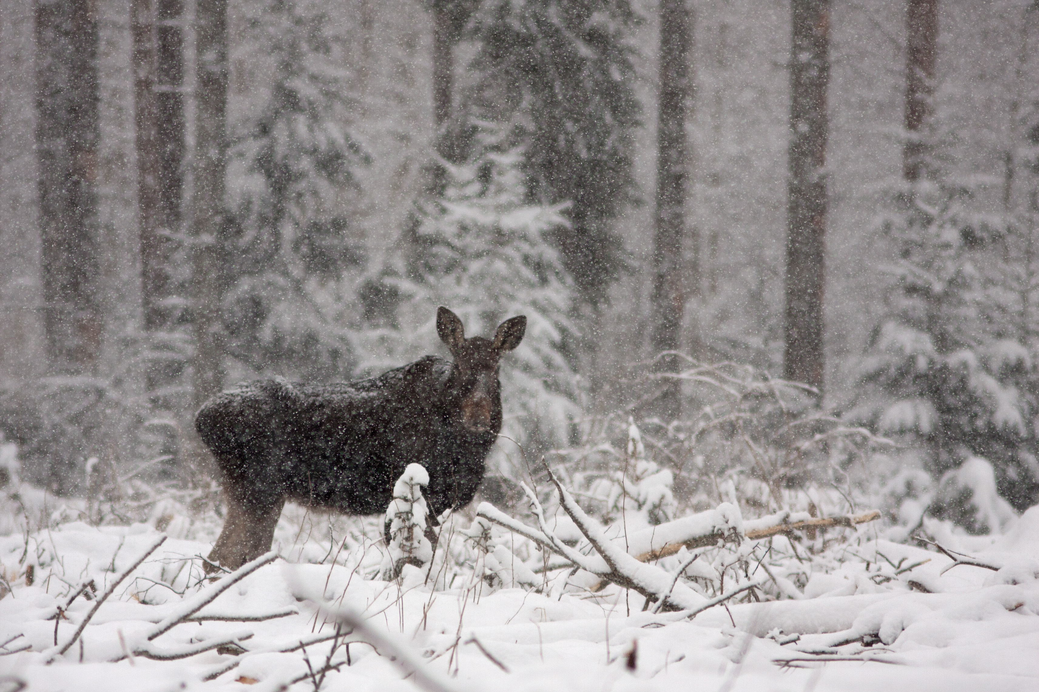 Põder Paunküla veehoidla ääres tihedas lumesajus.